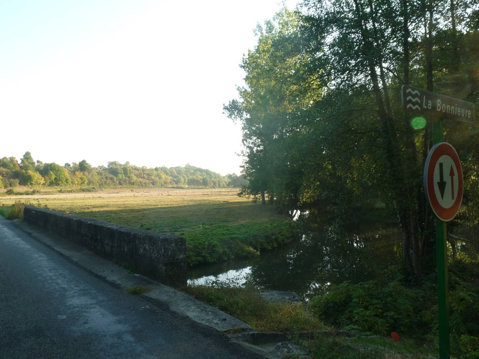 La Bonnieure à Ste-Colombe (16), France